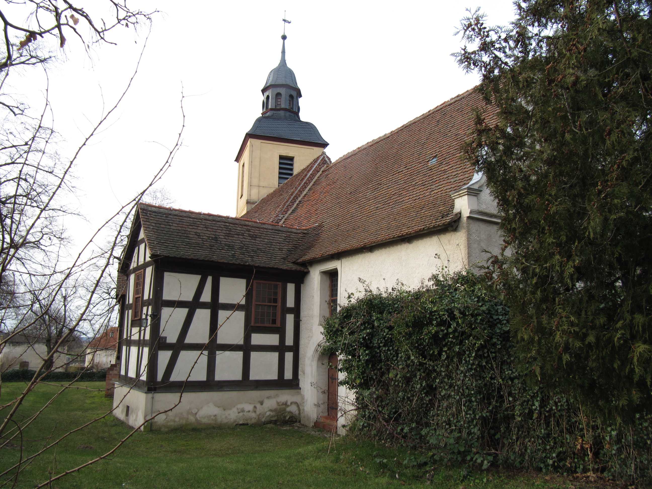 Kirche Ketzür von Südost